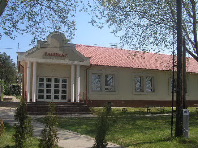 Bakonysárkányi kultúrház